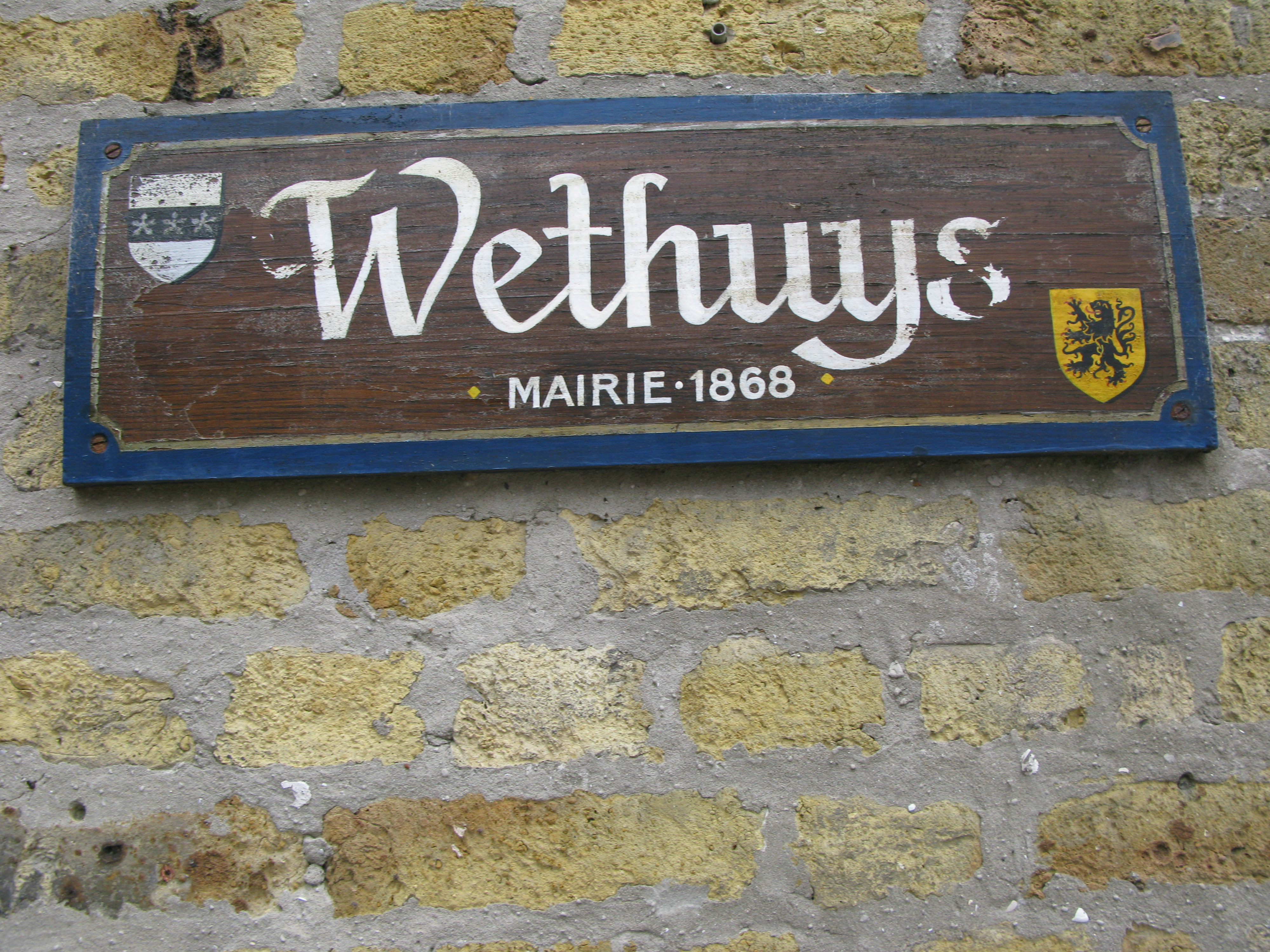 Panneau « Wethuys », wethuys, mairie de Brouckerque